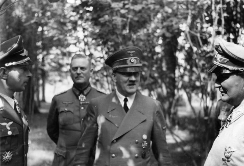 Der erfolgreiche deutsche Jagdflieger beim Führer. Der Führer im Gespräch mit Oberst Mölders, nebem dem Führer Reichsmarschall Göring und Generalfeldmarschall Keitel. 25.7.41 [Herausgabedatum]